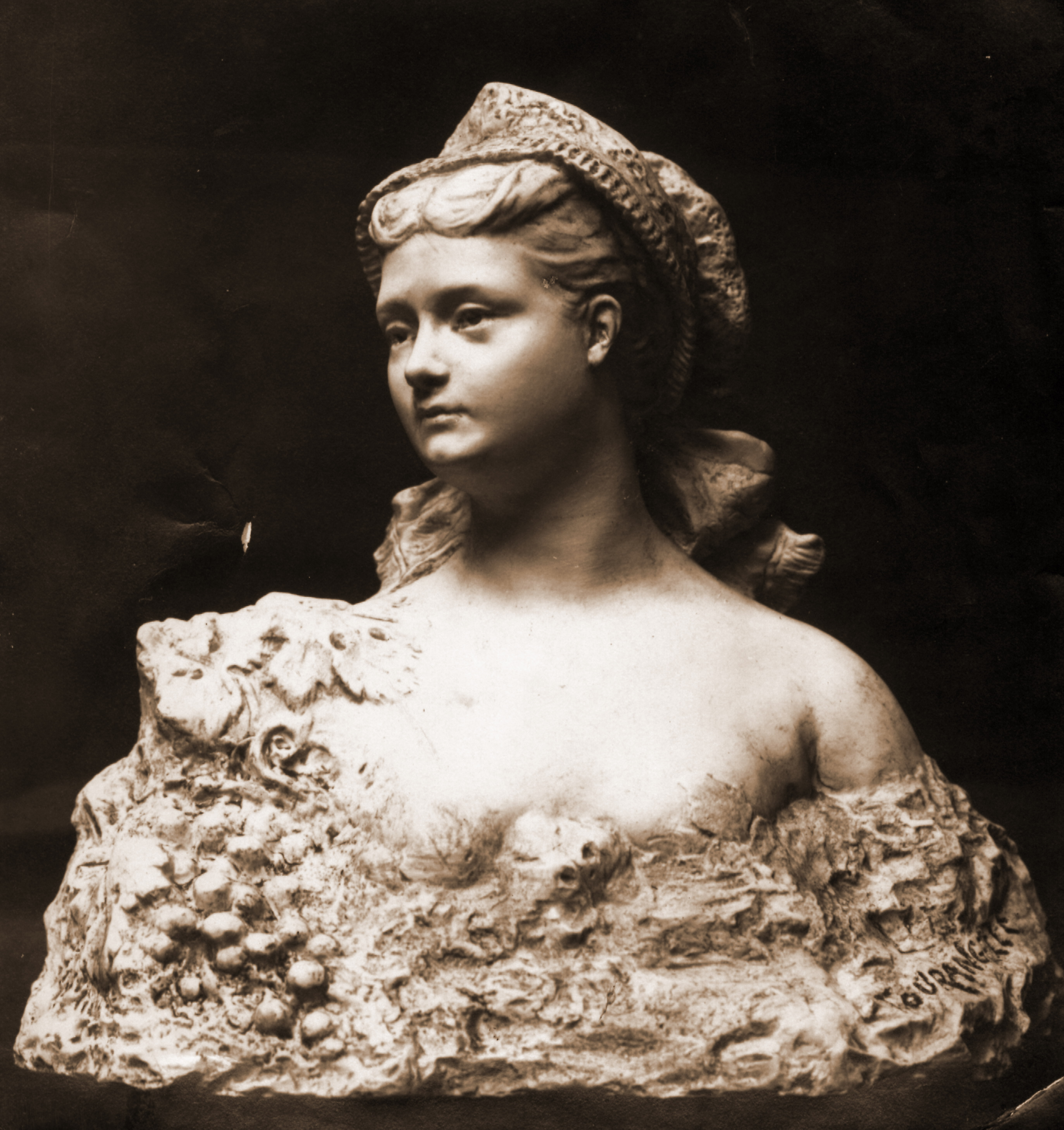 Georges Delpérier Sculpteur la Tourangelle No1